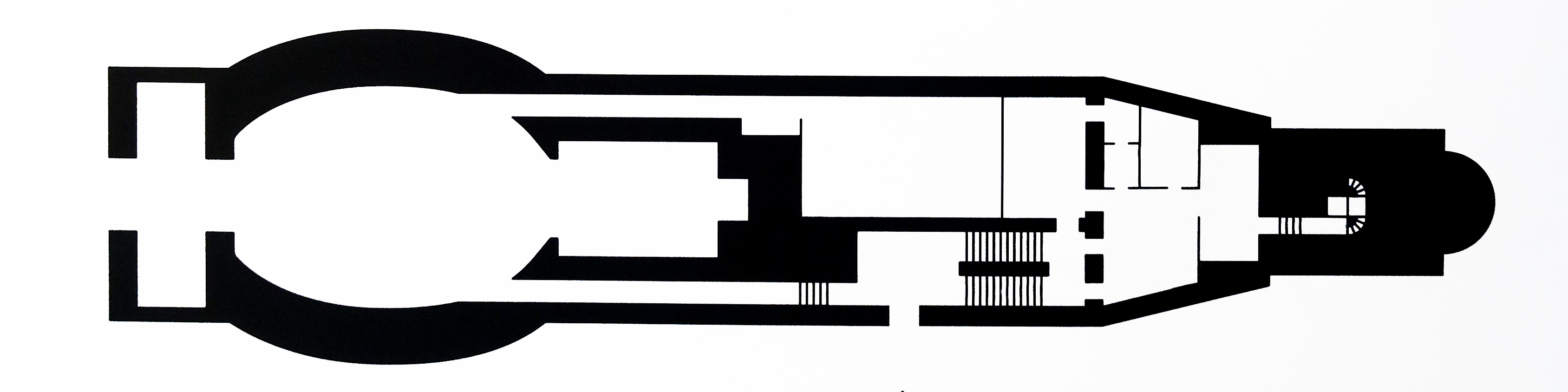 Igreja e Torre dos Clérigos, Porto, Planta do piso de entrada